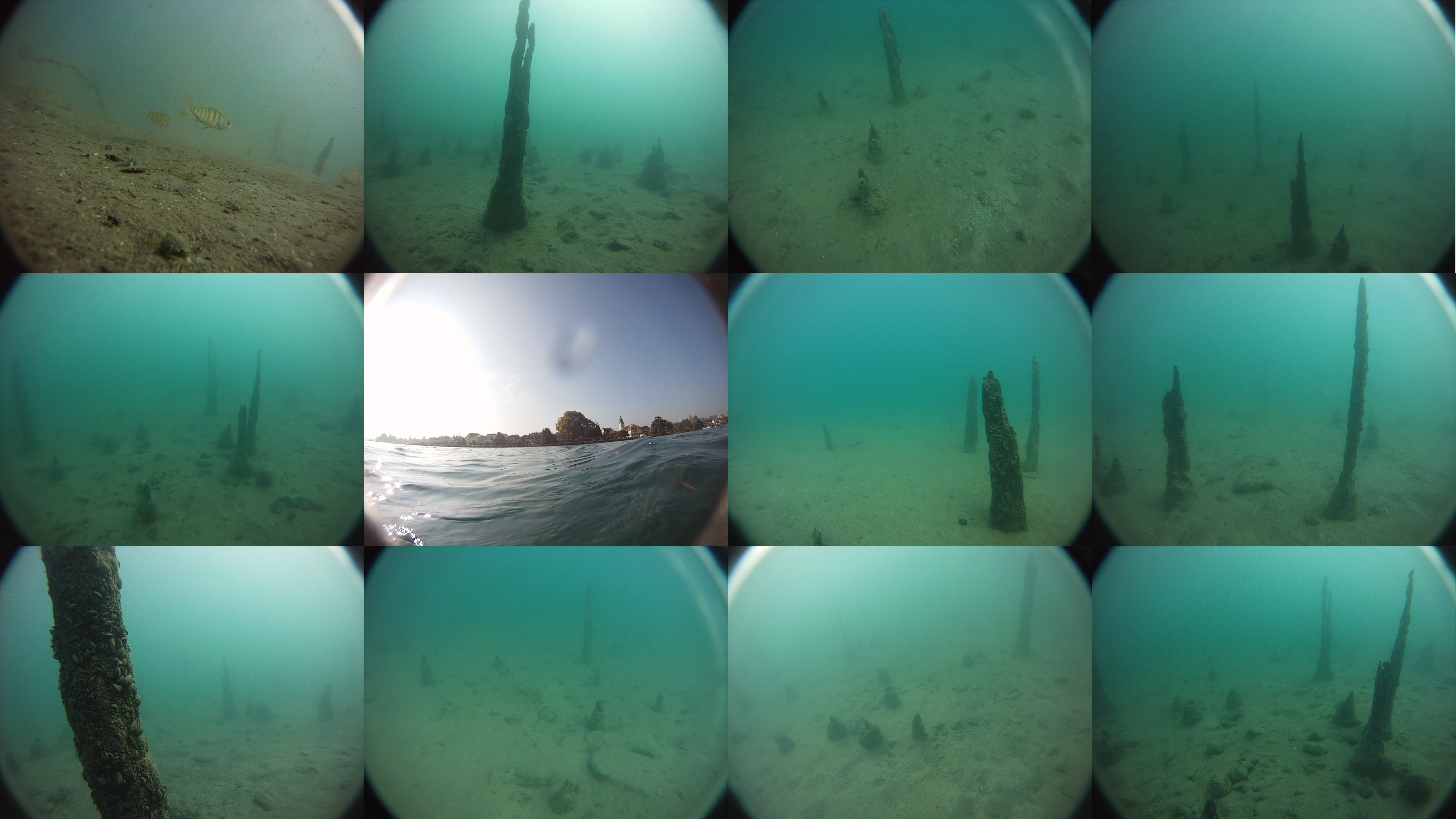 Capture d'une vidéo réalisée avec une GoPro (lentille plate) sur le site « Vers l'Église » des Stations de Morges, classé à au patrimoine mondiale de l'UNESCO. (CH-VD-12) Assemblage des images : je l'ai créé ainsi pour représenter d'une part que ces captures sont extraites d'une vidéo et d'autres part cela symbolise le réseau de construction. Une image est faite à la surface de l'eau, en dessus du site, on y aperçoit le Temple (l'Église) de Morges Cette prise d'images a été faite le 30 septembre 2011 en snorkling, la température du lac avoisinait les 20°C, extraordinaire pour une fin septembre !